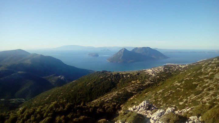 Θέα από τον Μπούμιστο, στο Αρχοντοχώρι. Αδειοδότηση Το παραπάνω αρχείο διανέμεται υπό τις δύο παρακάτω άδειες χρήσης. Μπορείτε να επιλέξετε την άδεια της προτίμησής σας.